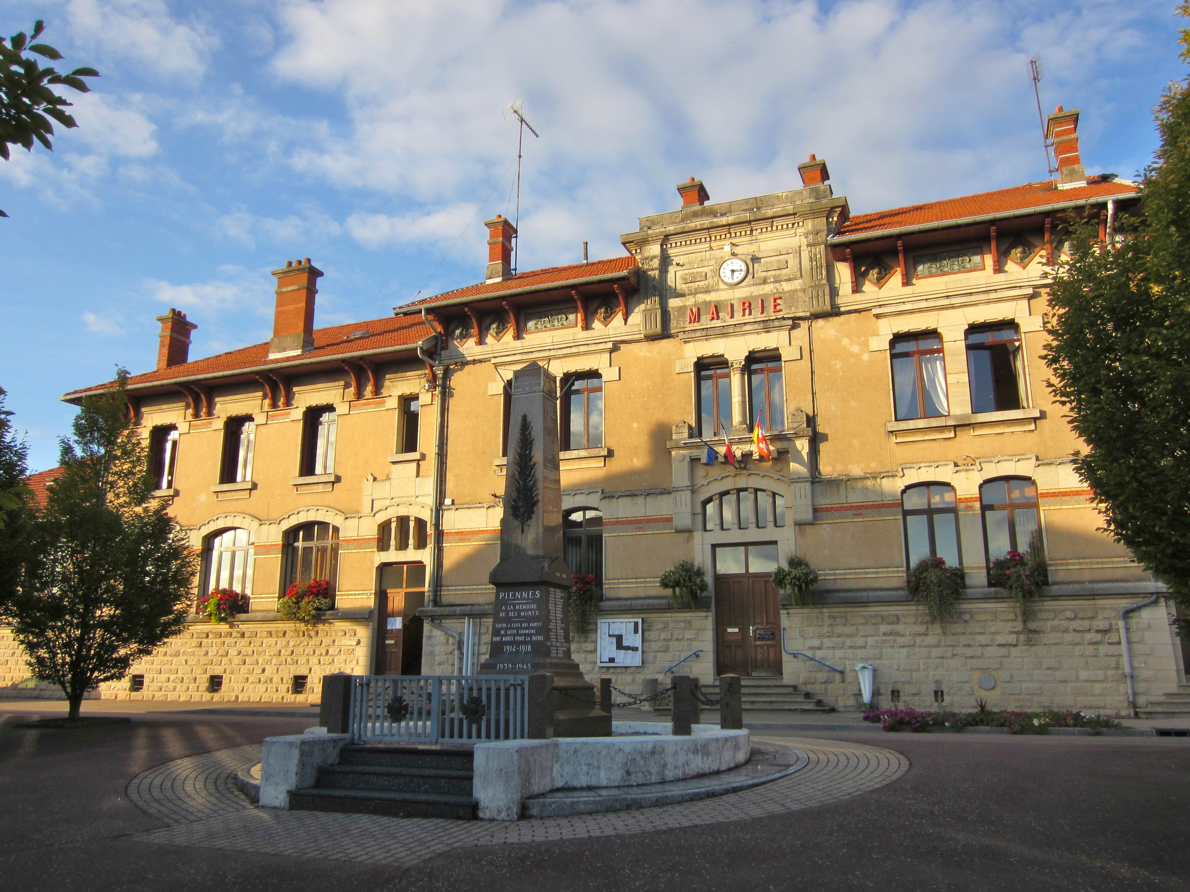 Description mairie Piennes mairie Piennes